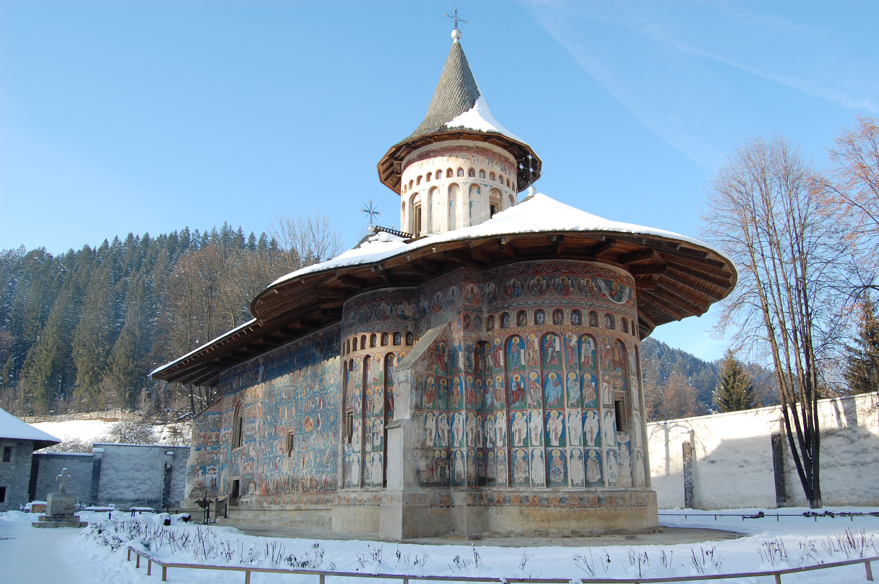 Voroneţ Monastery